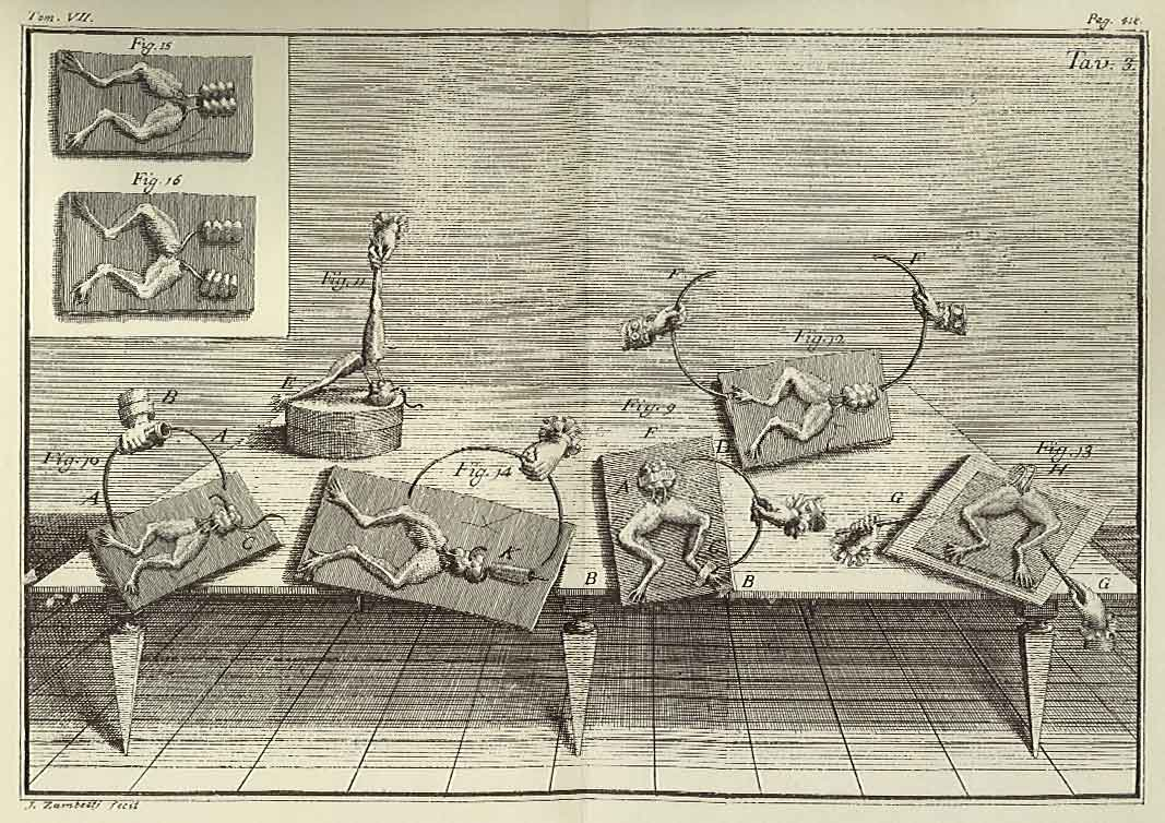 Disegno che illustra alcuni degli esperimenti effettuati da Galvani sulle rane. Credit: Dall'opera De viribus electricitatis... in motu musculari commentarius del 1791 - ampiamente diffusa sul web e dal copyright scaduto.